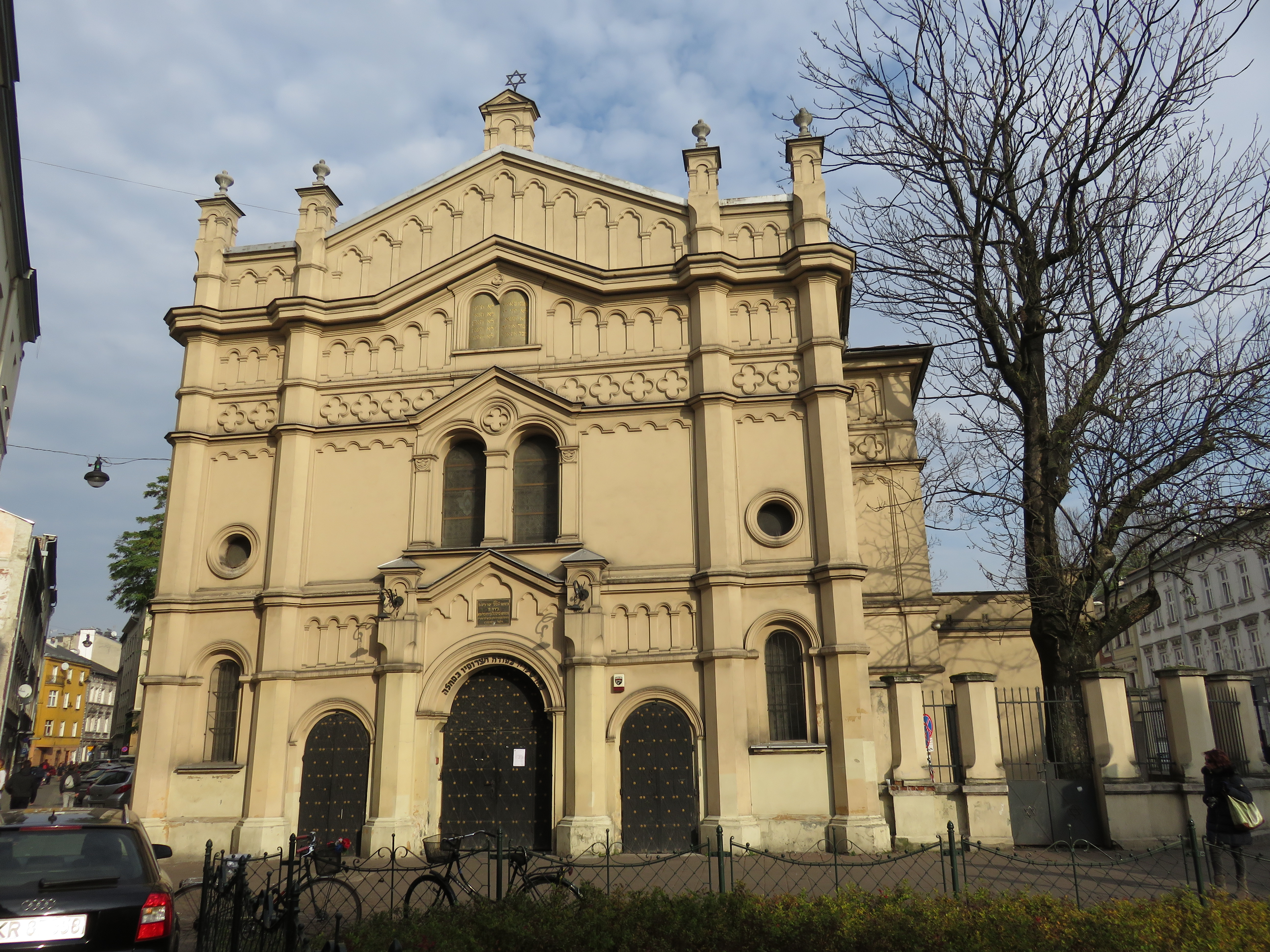 בית כנסת טמפל, קז'ימייז', קרקוב (10).jpg